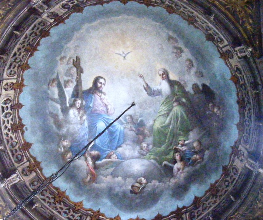 "Sfanta Treime" - pictură murală pe tavanul bisericii mănăstirii Agapia, jud. Neamţ. Autor: Nicolae Grigorescu 01